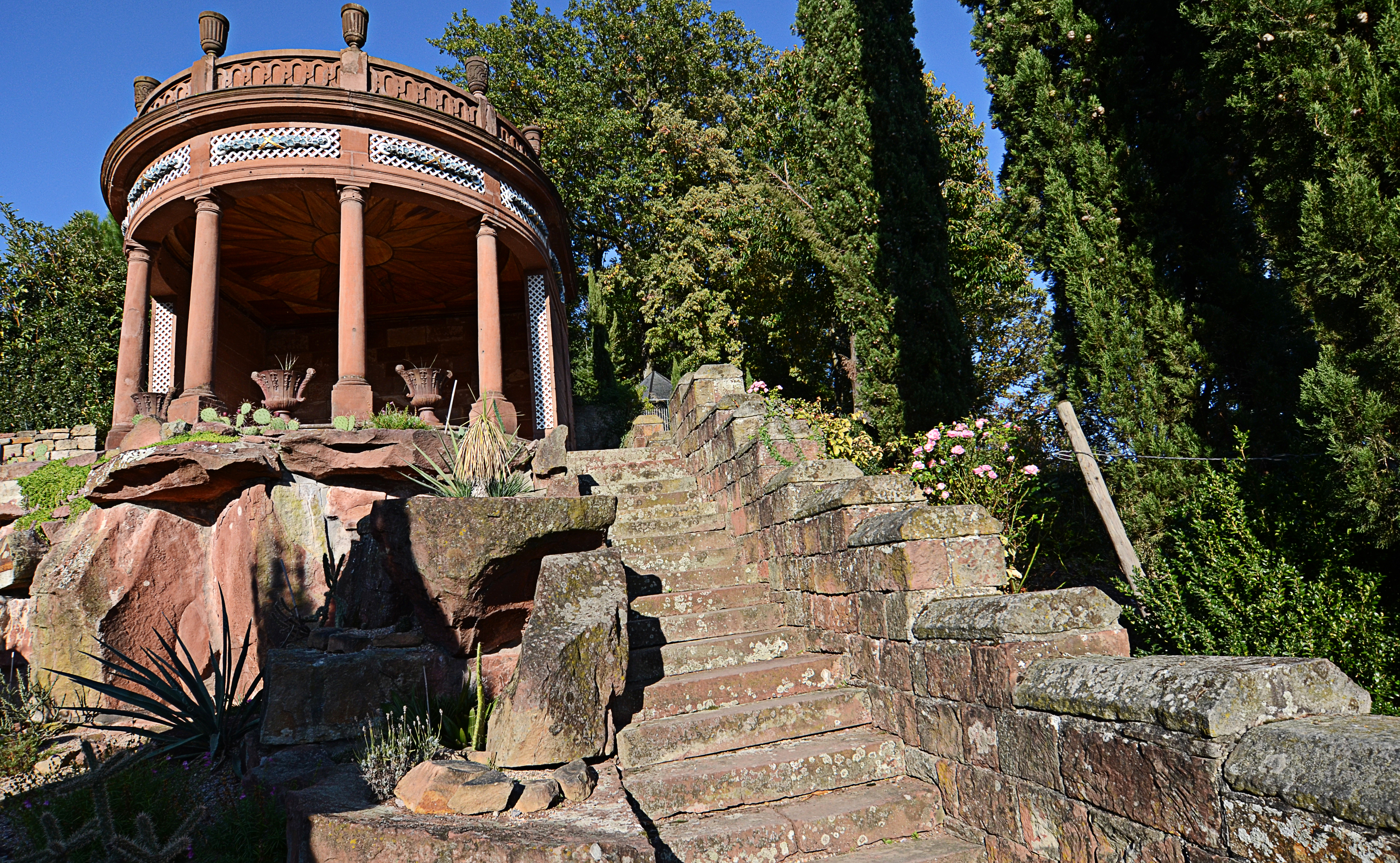 Sonnentempel im Park der Privatklinik in Gleisweiler